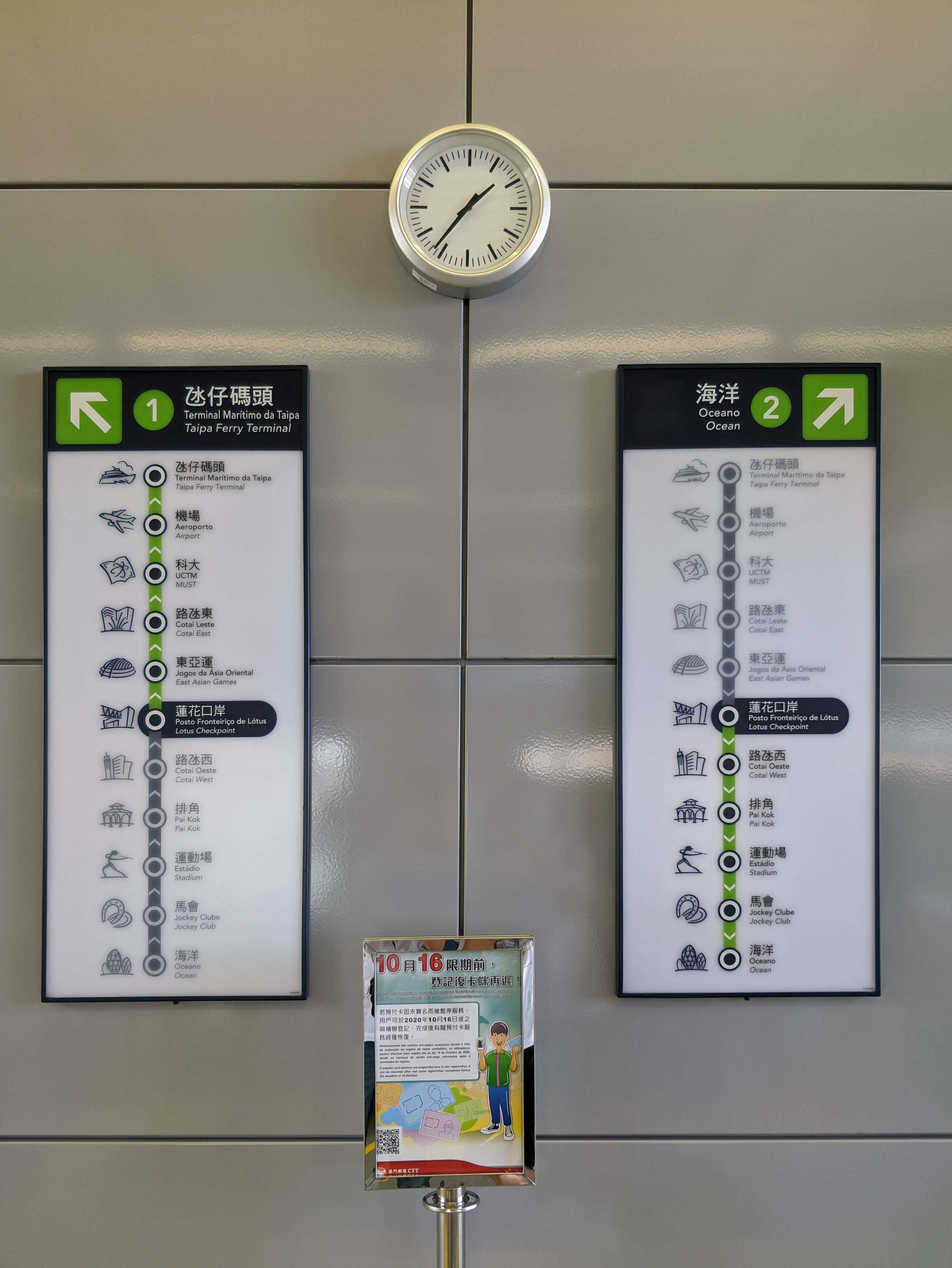 中文（香港）: 澳門輕軌站內地圖，蓮花口岸站